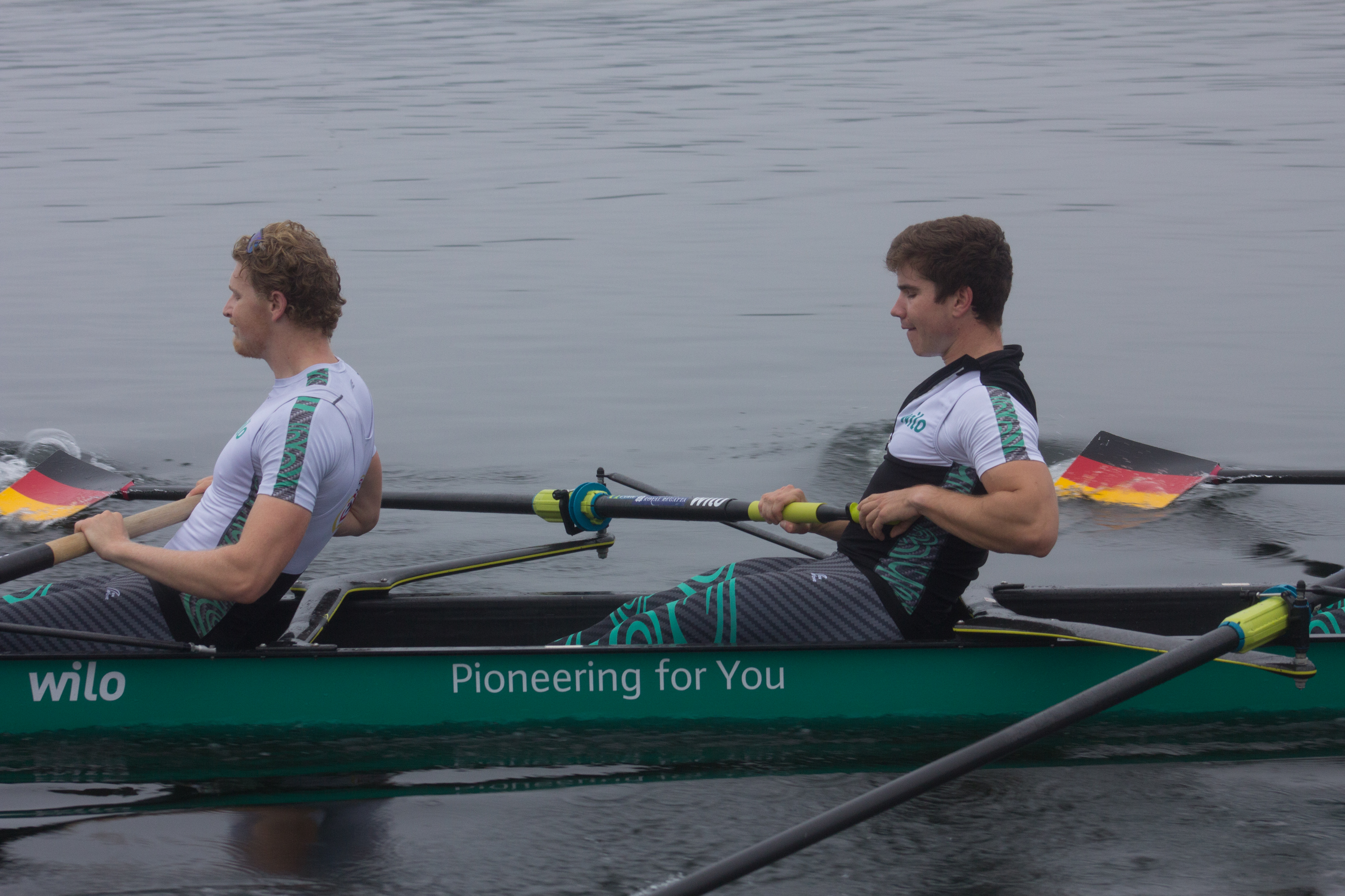 Medientag des Ruderverbandes in der Ruderakademie Ratzeburg am 6. September 2017: Deutschland-Achter im Training auf dem Ratzeburger See in der Besetzung: Johannes Weißenfeld, Felix Wimberger, Maximilian Planer, Torben Johannesen, Jakob Schneider, Malte Jakschik, Richard Schmidt, Hannes Ocik, Martin Sauer